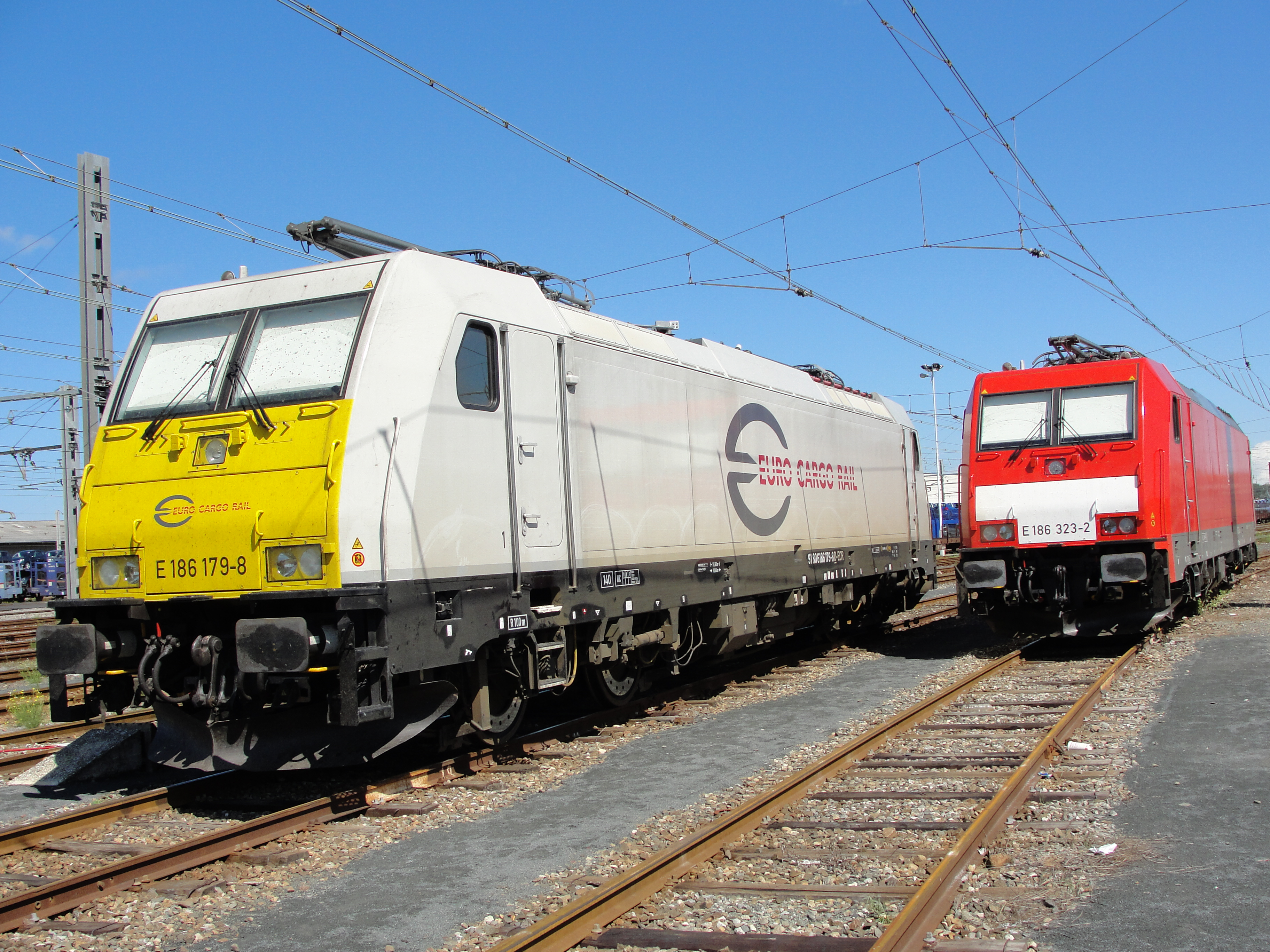 Zwei Bombardier Traxx E 186 am Bahnhof Hendaye in der Region Pyrénées-Atlantiques. Beide Maschinen fahren für Euro Cargo Rail, eine ist aber von DB Schenker geleased.